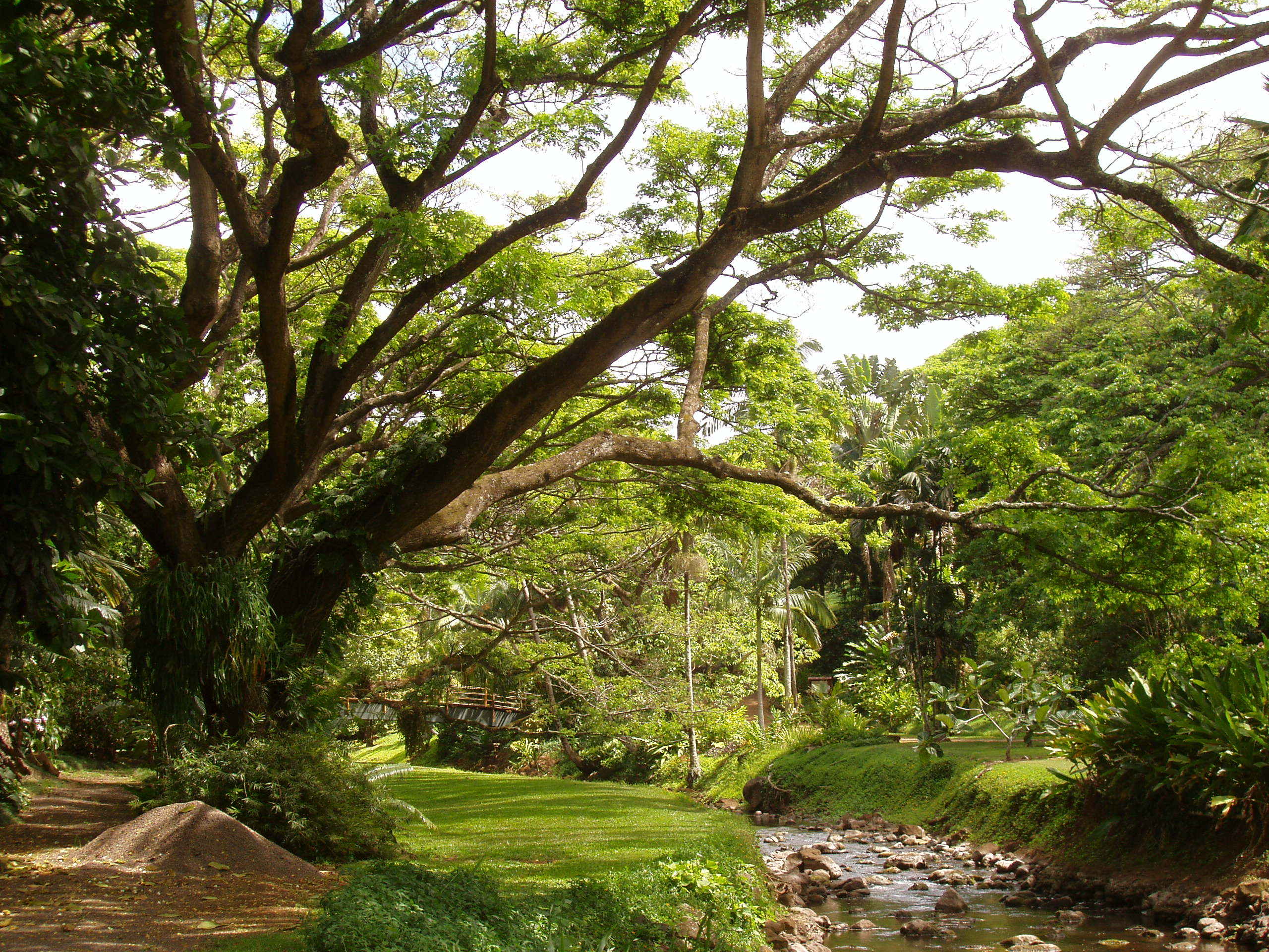 McBryde Garden, Kauai, Hawaii - stream view.